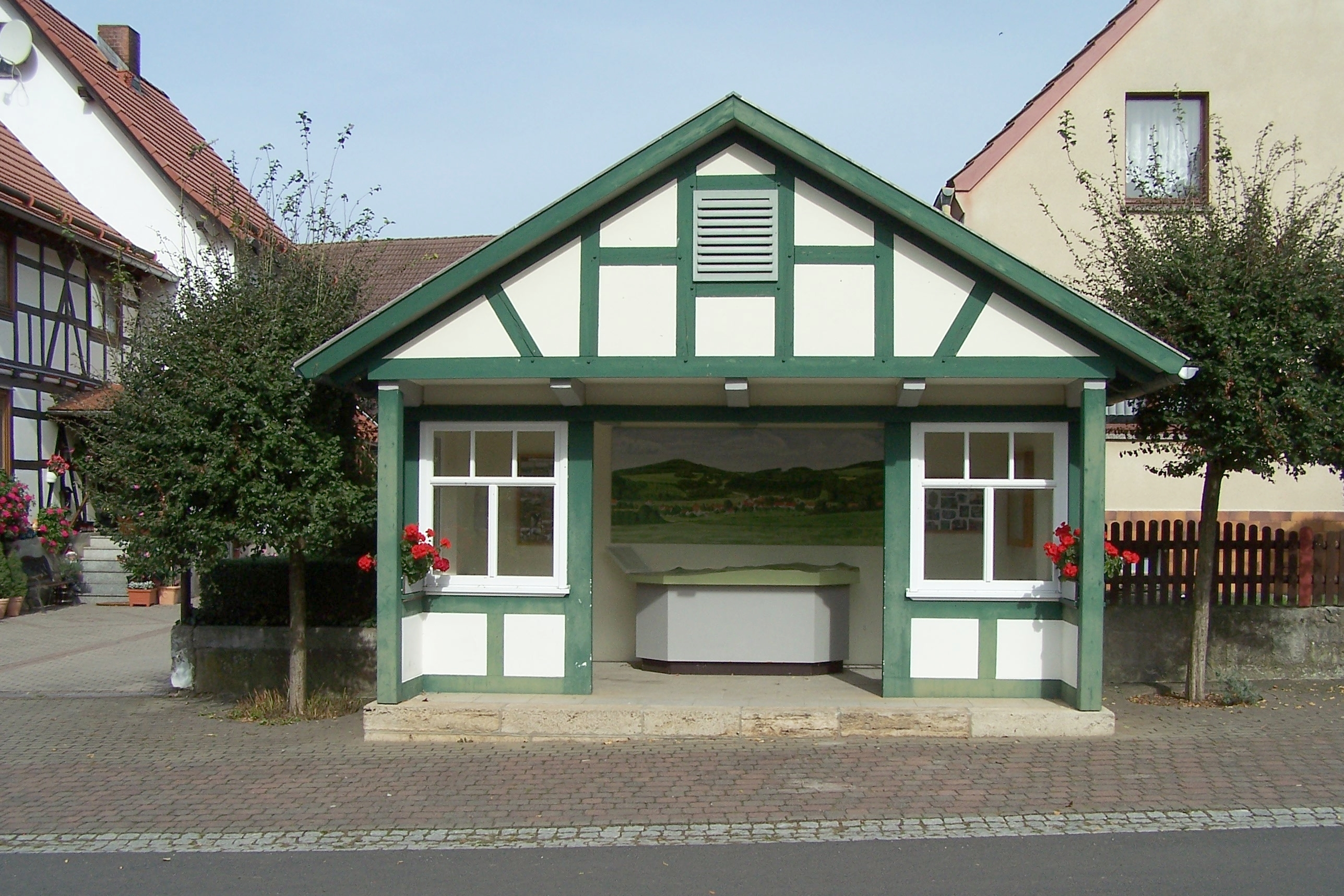 Hier kommt kein Besucher vorbei - die Heimatstube in Kranlucken ist 24 Stunden geöffnet. Im Inneren der ehemaligen Bushaltestelle finden sich Schautafeln und ein Geländemodell der Umgebung.